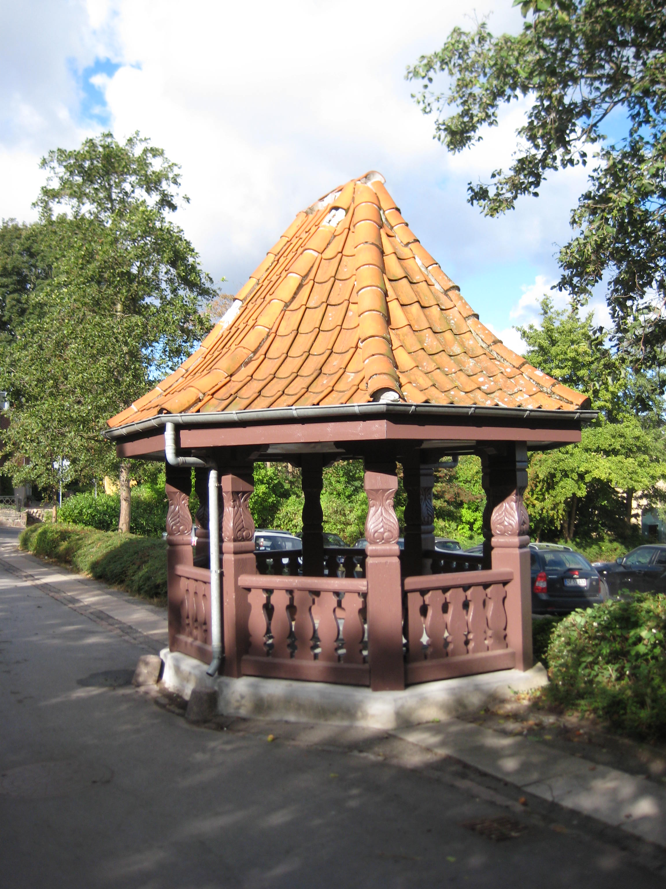 Maglekilde